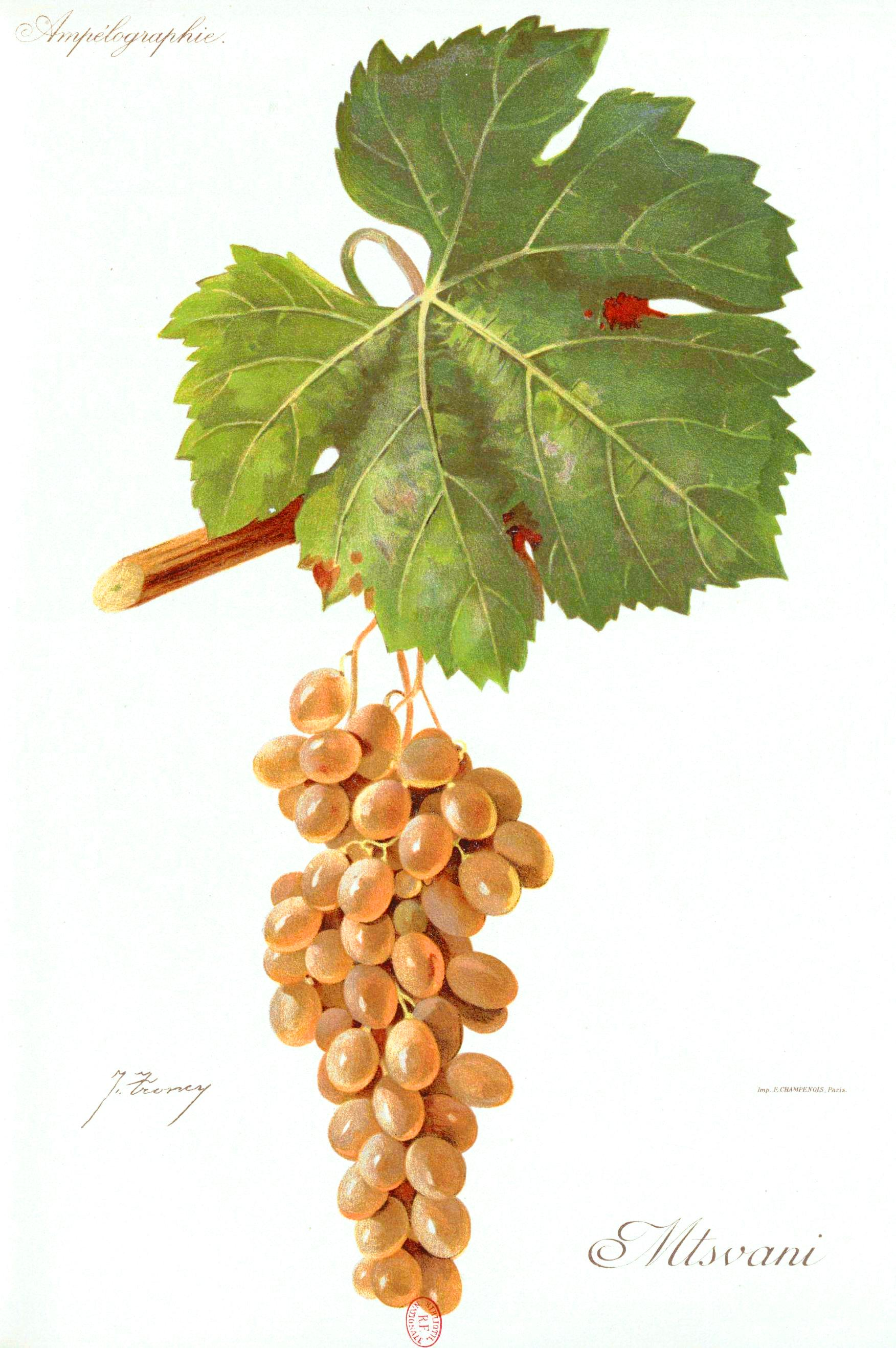 მწვანე კახური